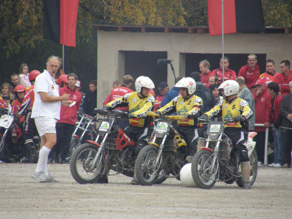 Motoballendspiel 2007